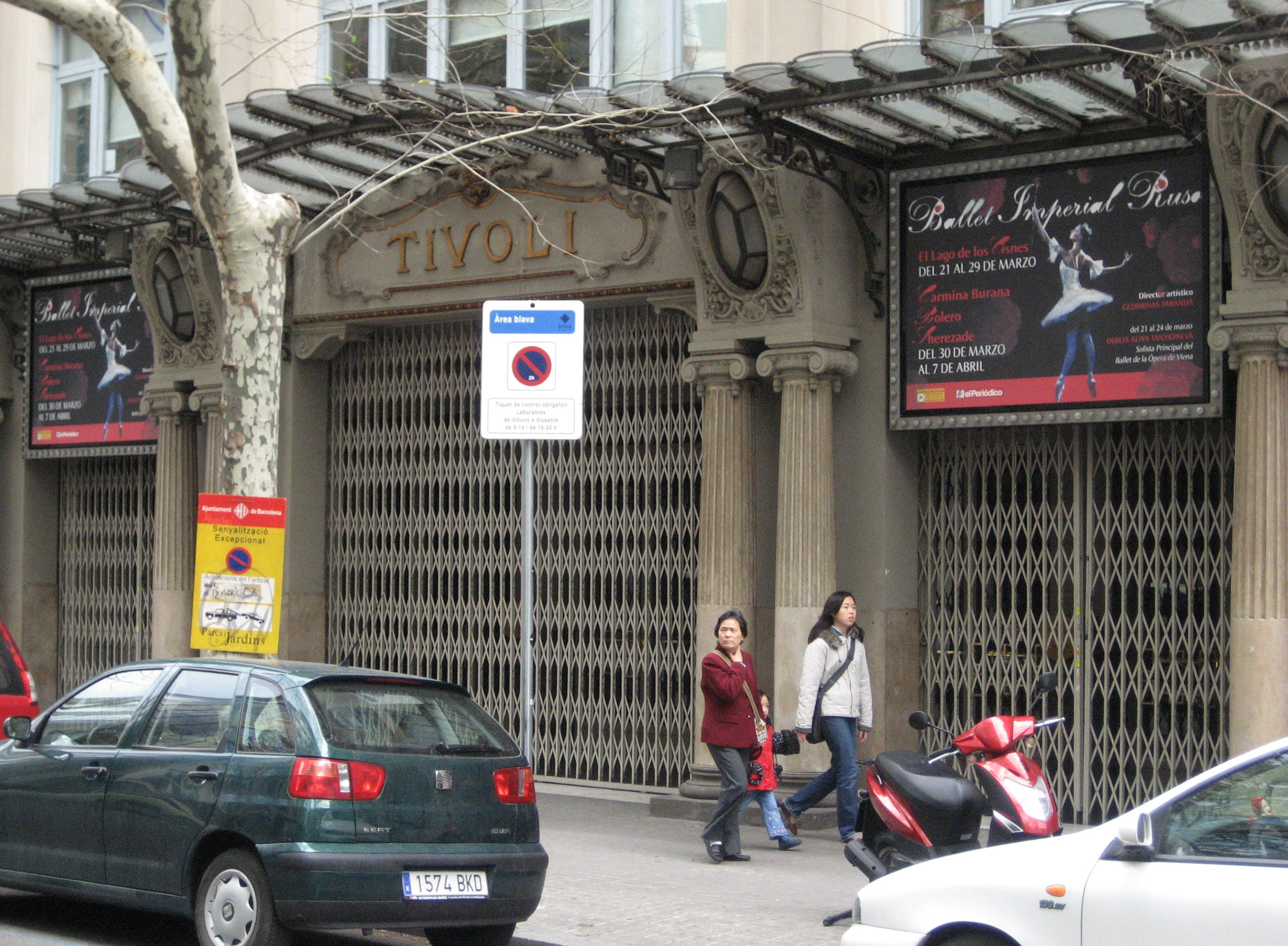 Porta d'entrada del Teatre Tívoli de Barcelona